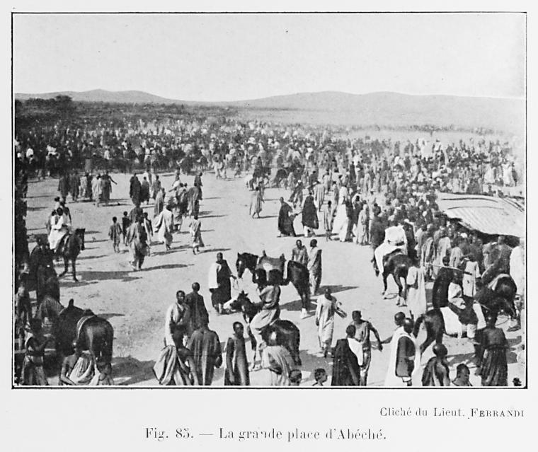 La grande place d'Abéché. From L'Afrique Équatoriale Française: le pays, les habitants, la colonisation, les pouvoirs publics. Préf. de M. Merlin. Avec 186 reproductions photographiques, 33 diagrammes, profils, et 7 cartes dont 5 en couleurs, (published 1918).